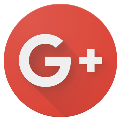 Logo G+ depuis sept.2015